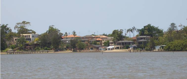 Kangaroo Point